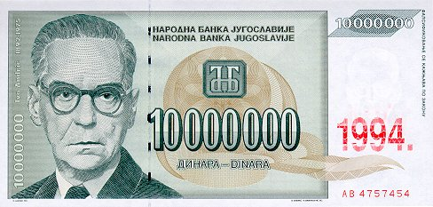 10,000,000 Yugoslav dinars note (1994 dinar)